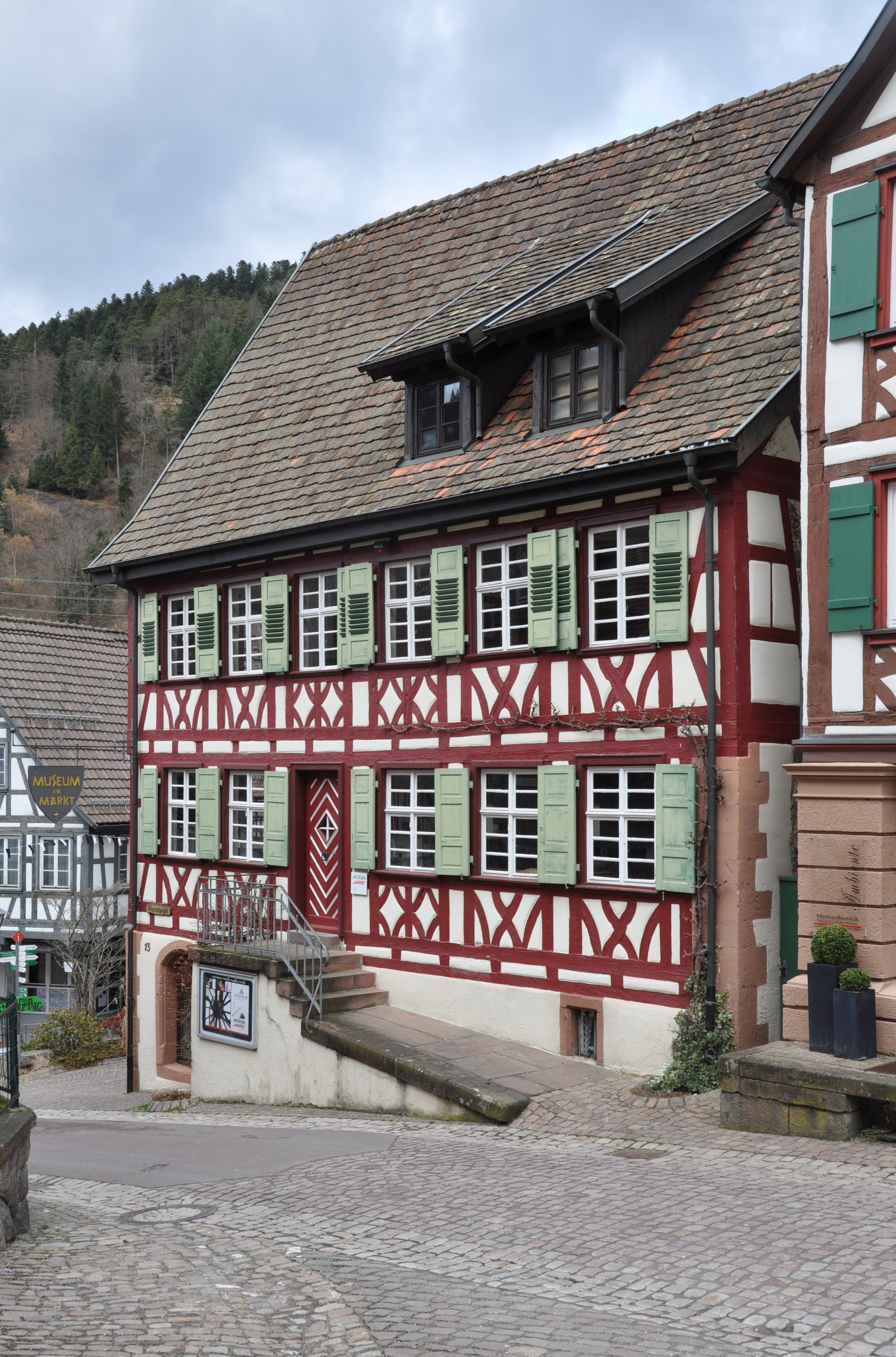 Schiltach, Marktplatz 13, Museum am Markt